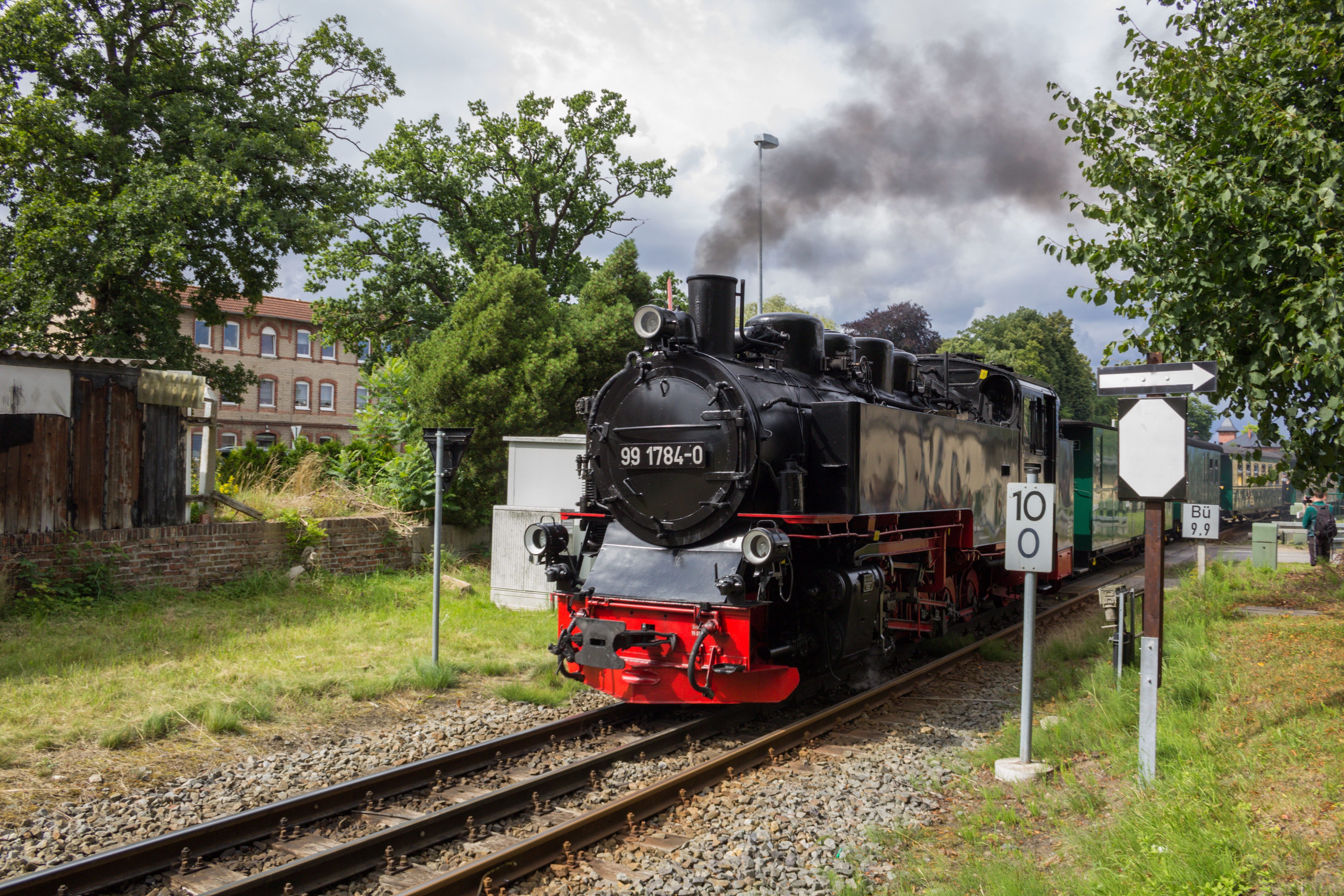 Vorbeifahrt der Lok 99 1784-0 der Rügenschen Kleinbahn am Streckenkilometer der Strecke Bergen auf Rügen–Lauterbach Mole am Streckenkilometer 10,0